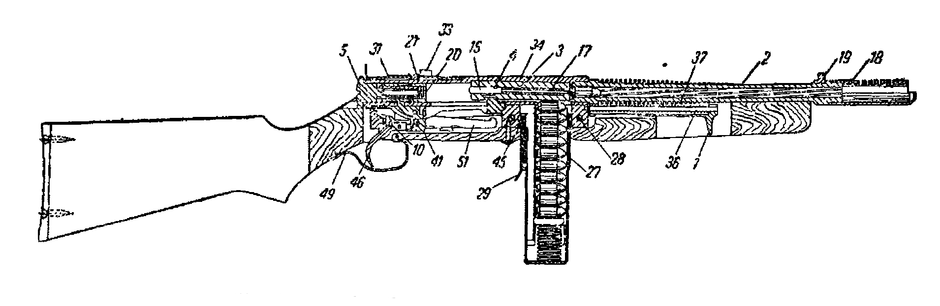 Reising SMG interal drawing